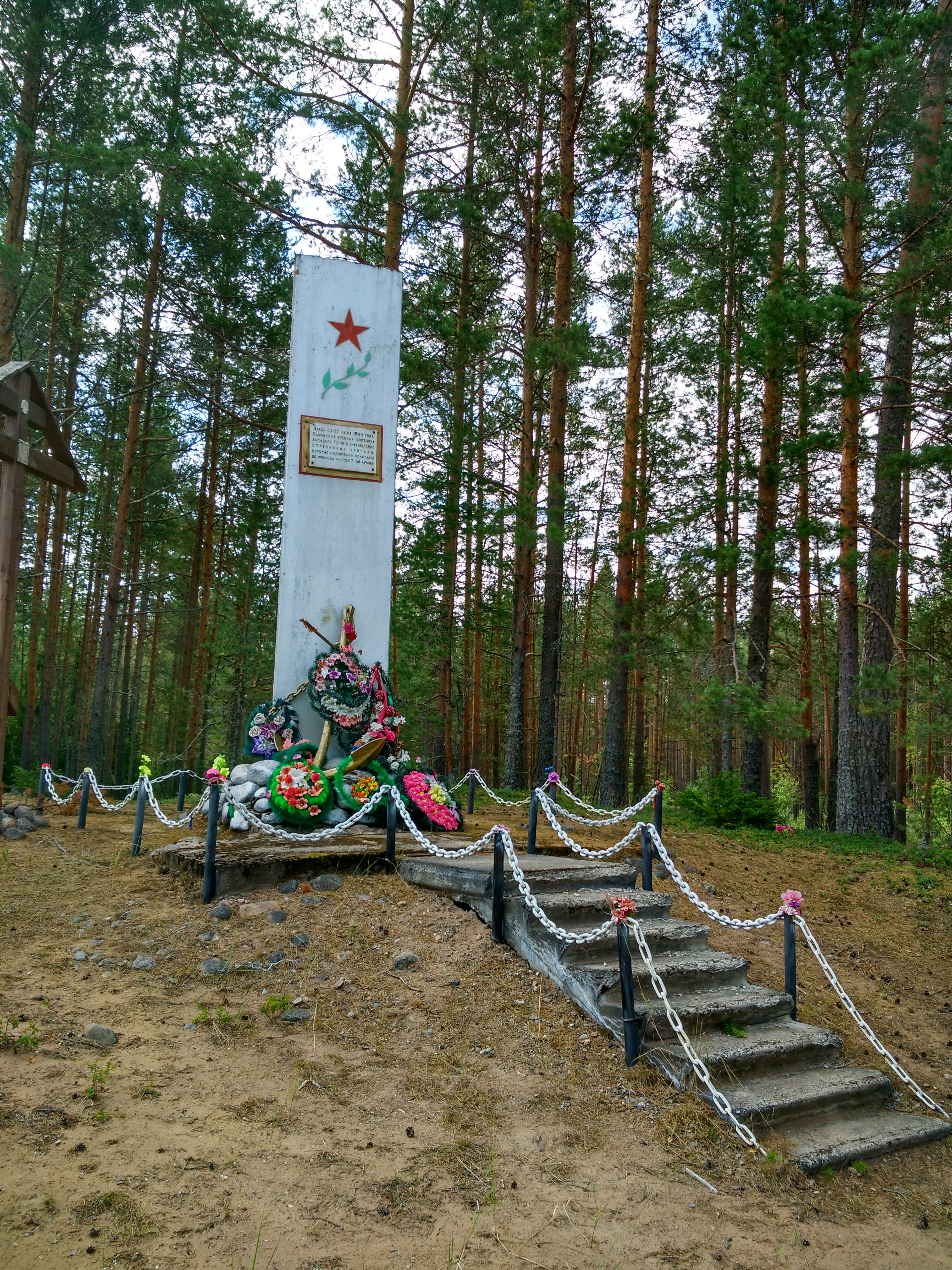 Памятное место, где 23 и 25 июня 1944 г. Ладожской военной флотилией были высажены десанты моряков 70 и 3 морских стрелковых бригад, обеспечивших успешное продвижение войск 7 армии: в 3 км от посёлка у ж/д переезда в сторону Видлицы, Устье Тулоксы, Олонецкий район, Карелия